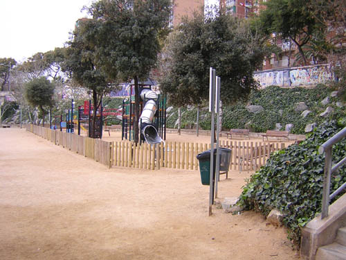 Парк.